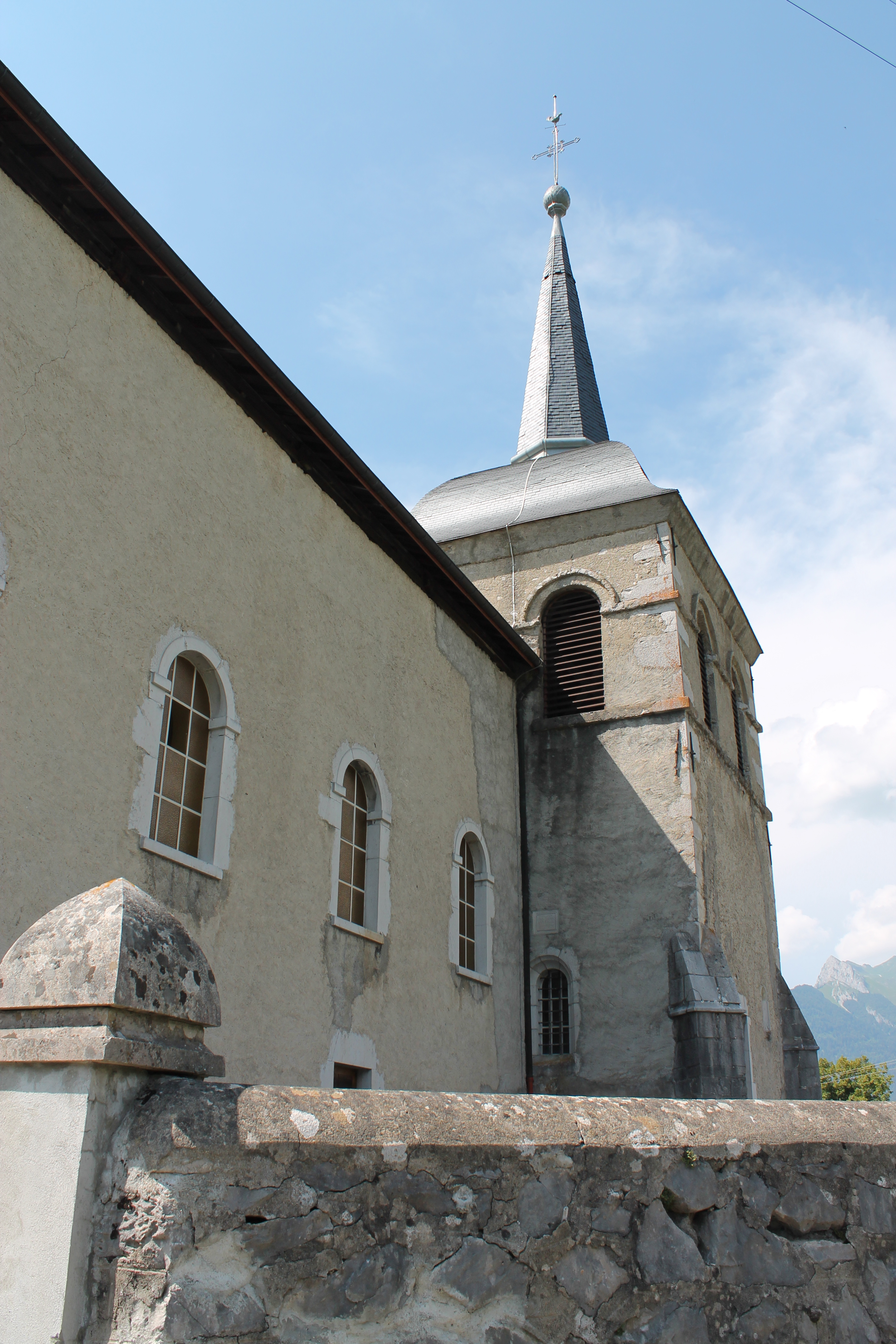 Église Saint-Sigismond de Seythenex (XIXe siècle)